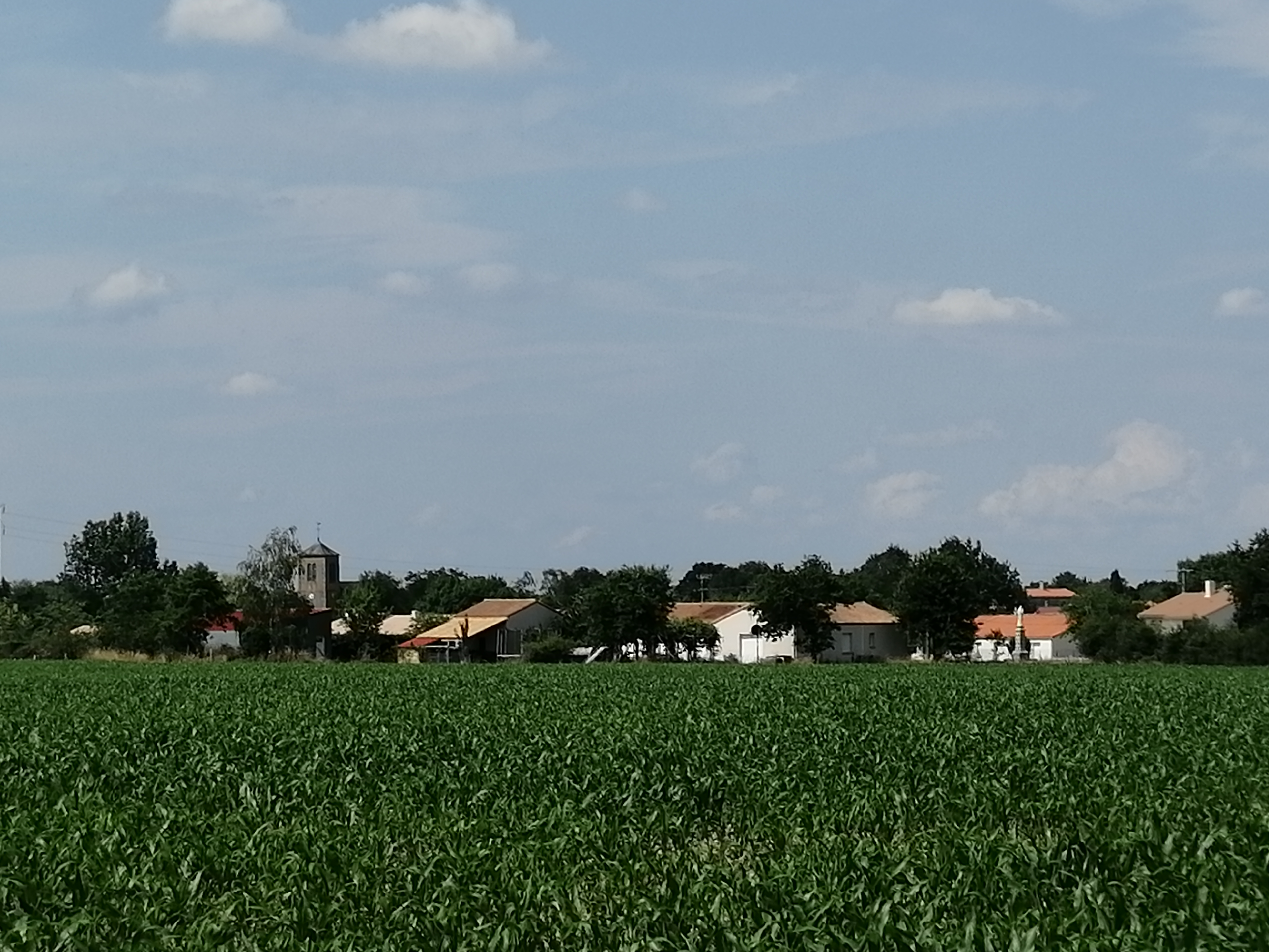 Illustration du bocage